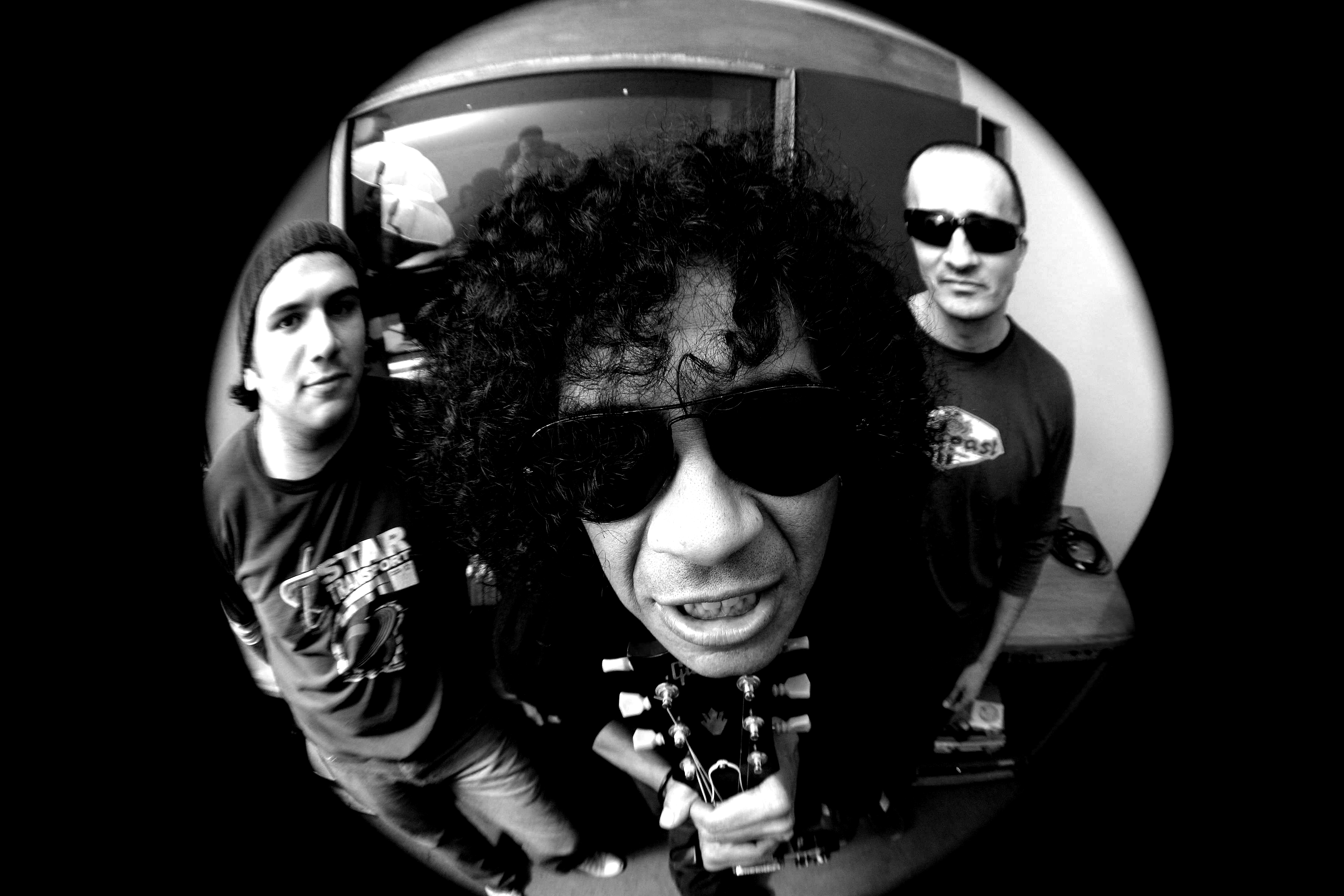 Carlos "El Negro" García López con su banda es estudios.